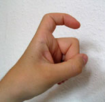 Chinesische Zahl Neun